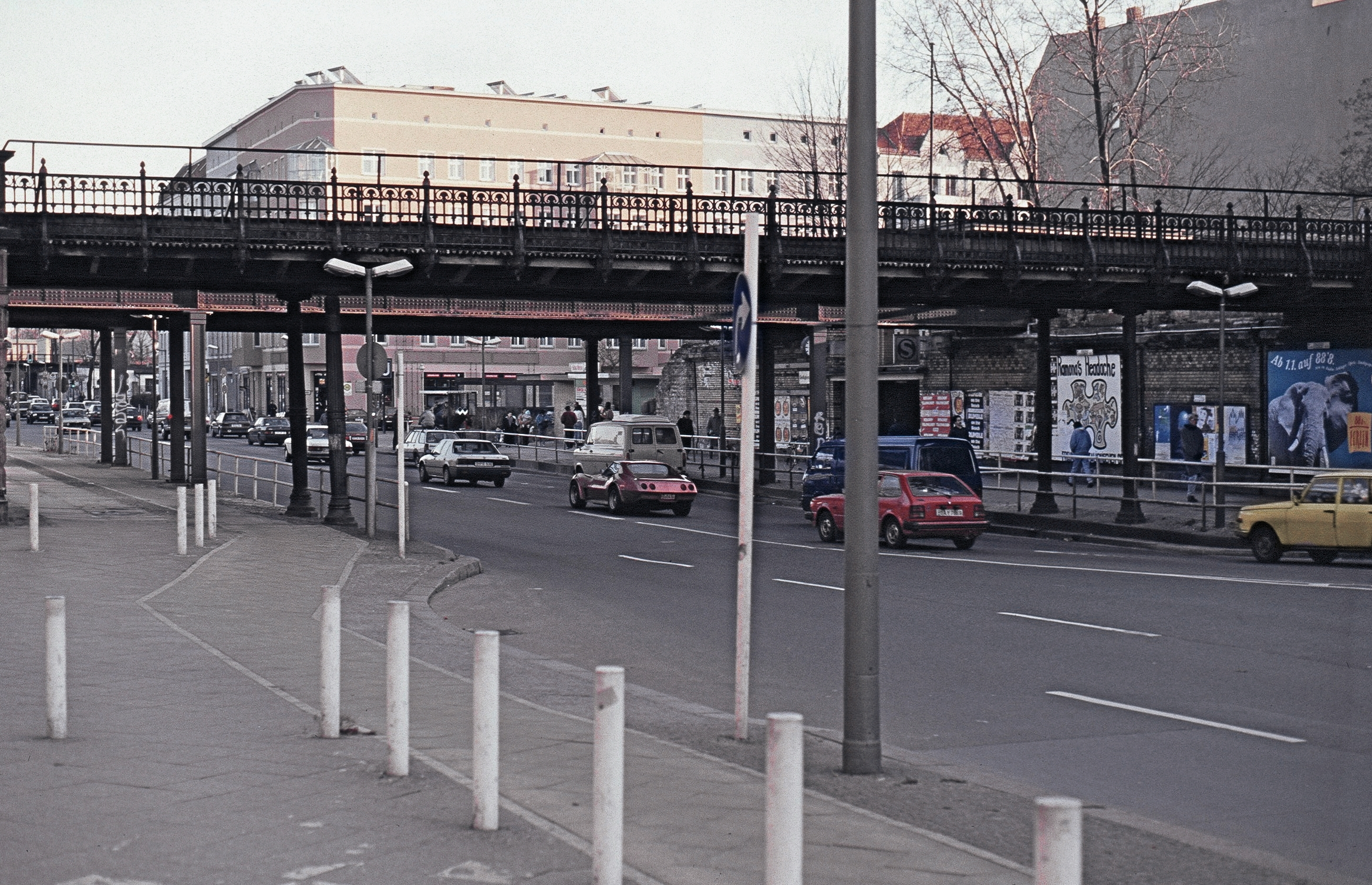 Yorckstraße Berlin Brücke Potsdamer Bahn